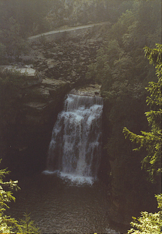 self made